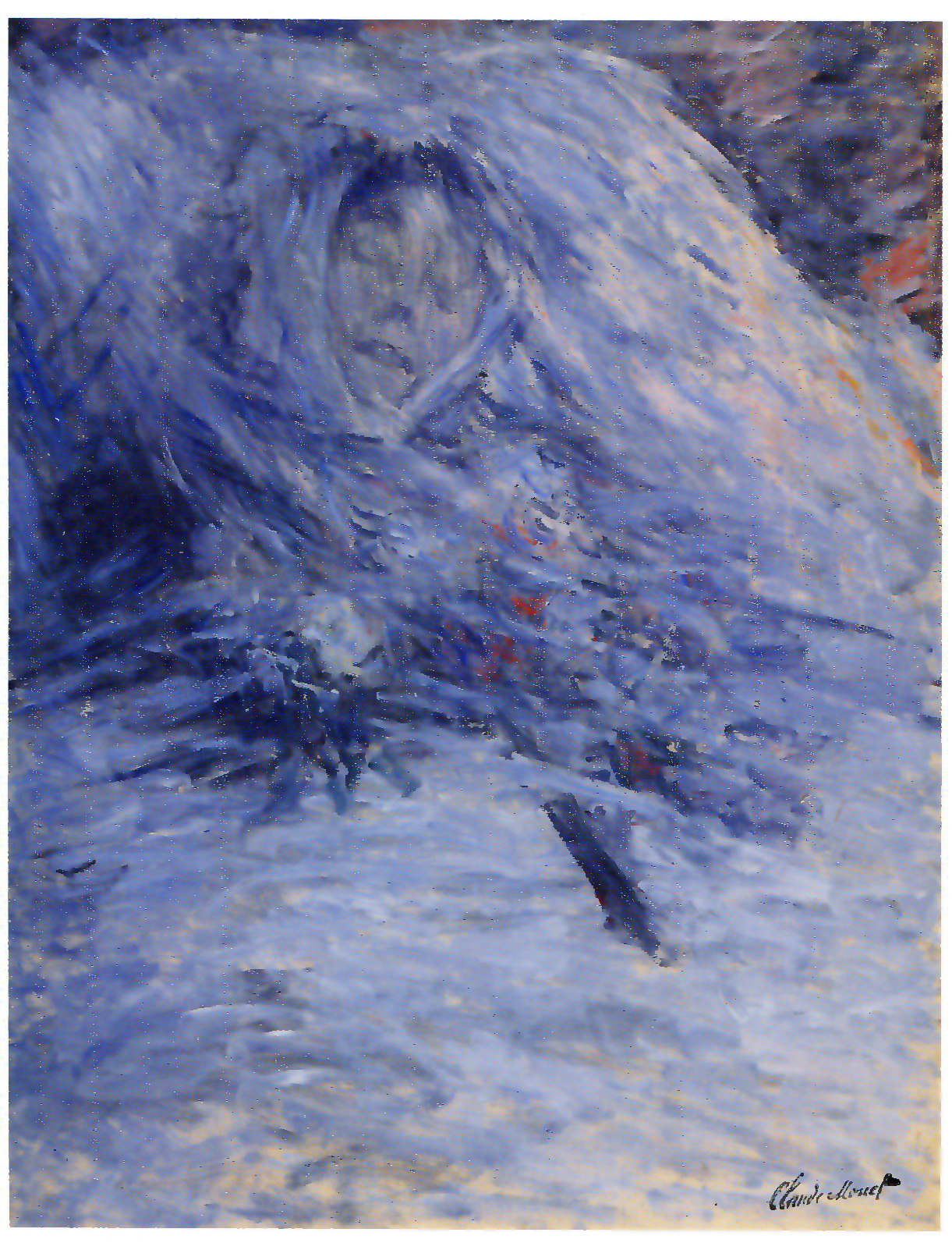 Camille Monet auf dem Totenbett